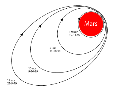 Illustrator